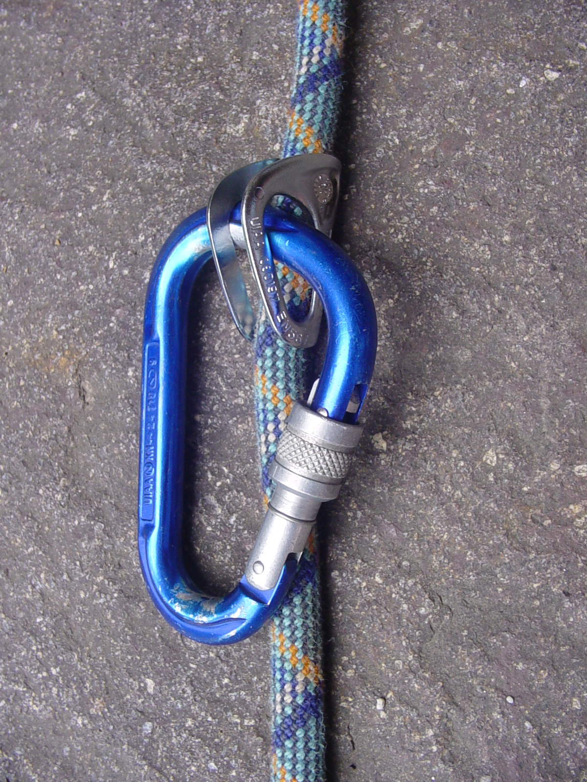 Petzl Tibloc mit eingelegtem Seil